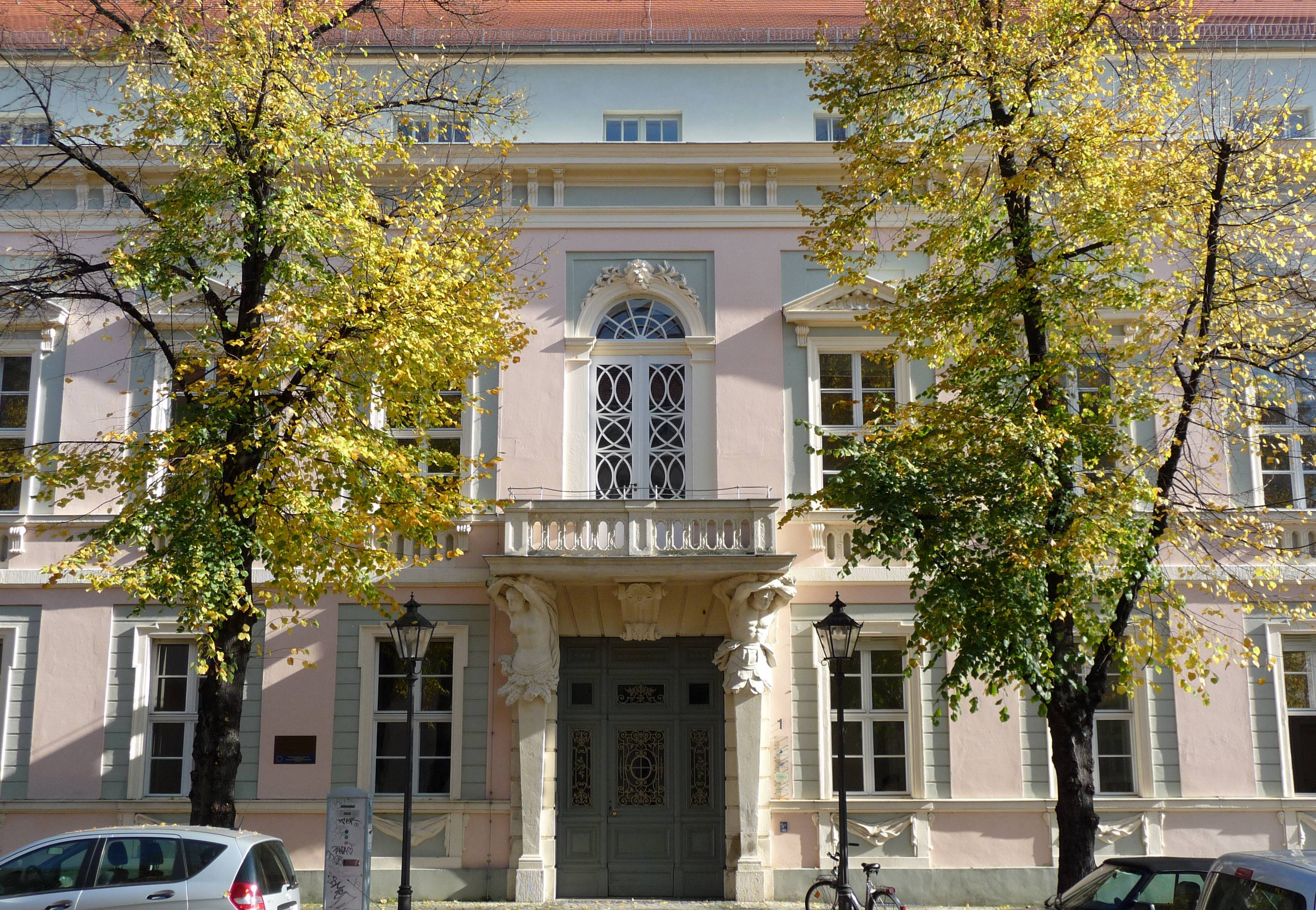 Foto der Frontalansicht vom Kabinettshaus, in der Straße Am Neuen Markt Nummer 1 in Potsdam, Deutschland